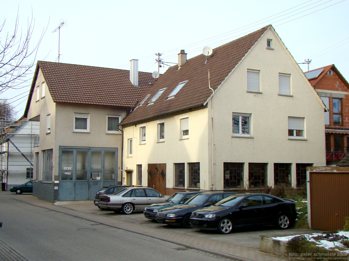 Überbauter ehemaliger Standort der Synagoge in Schwaigern-Massenbach.